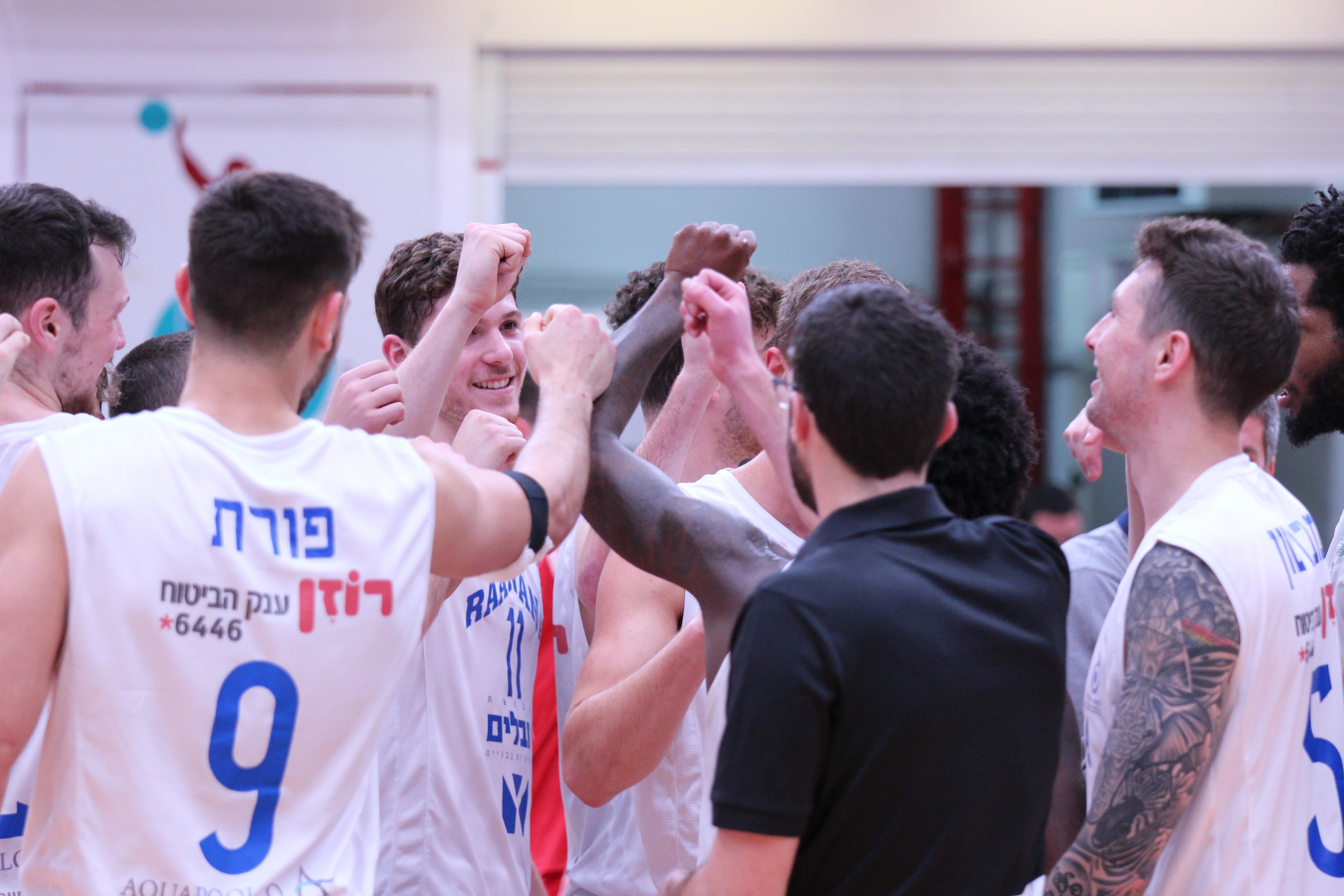 שמחת הניצחון של השחקנים אחרי המשחק מול הפועל חבל מודיעין שנת 2020